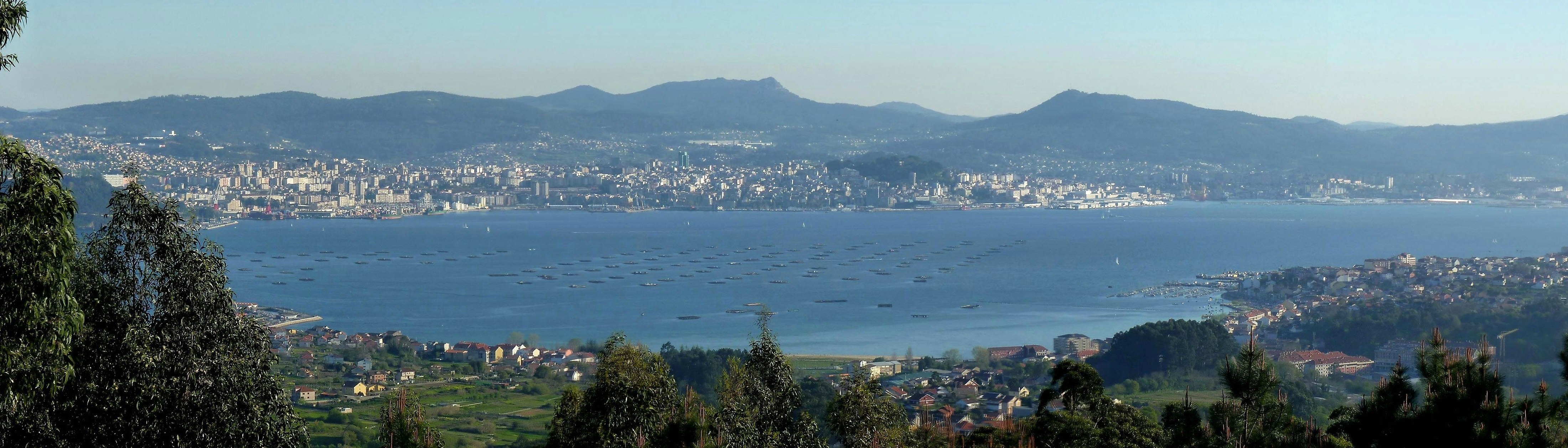 Vigo e a ría dende Moaña